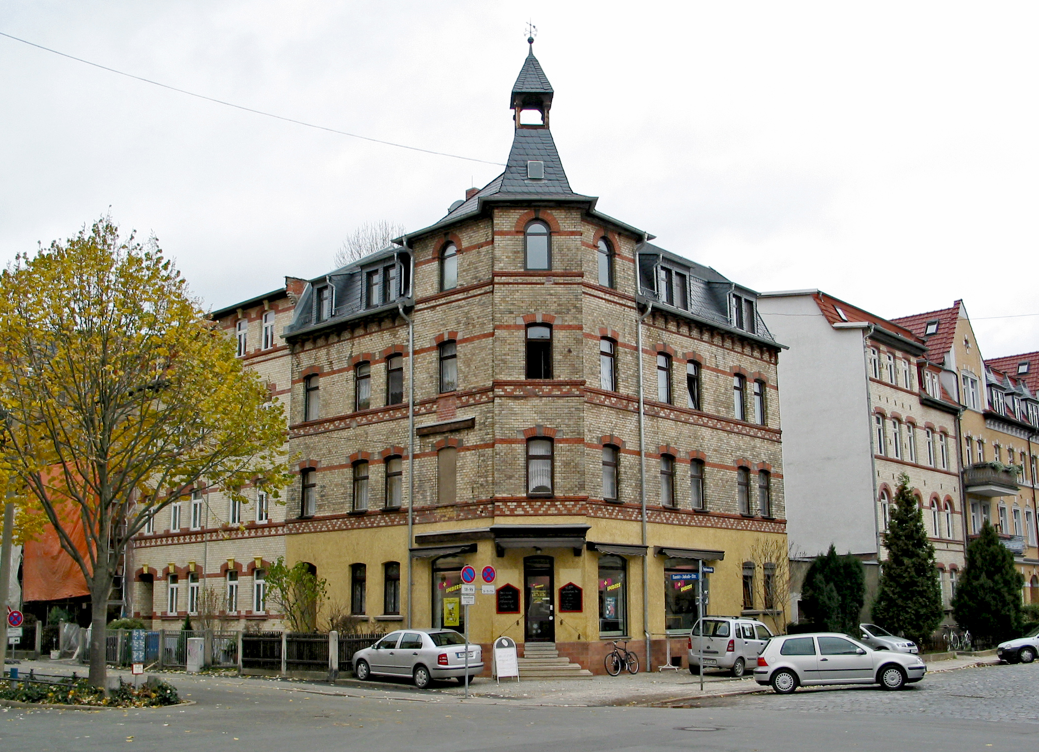 Damenviertel - Gründerzeit-Bau